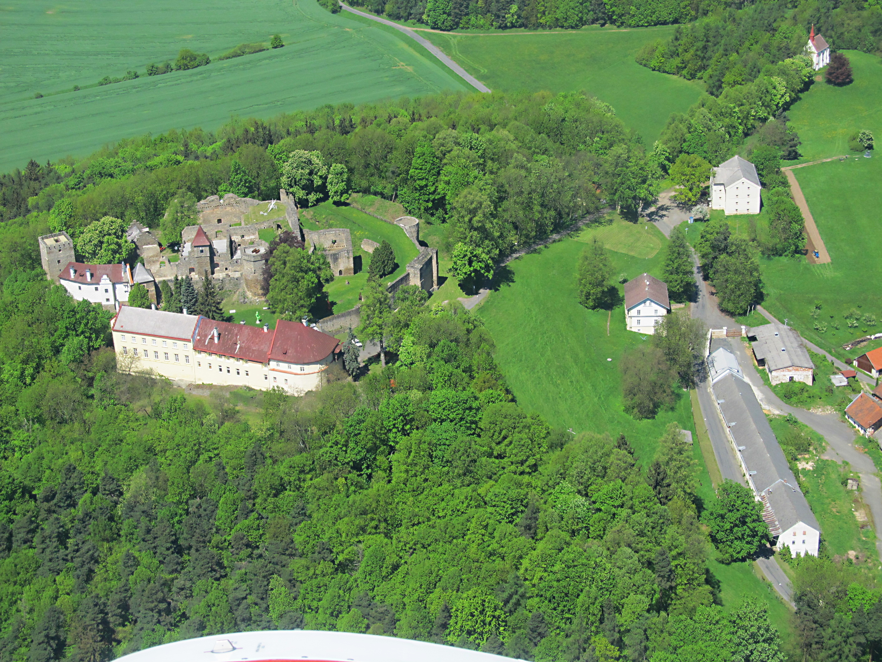 Hrad Klenová z nebe